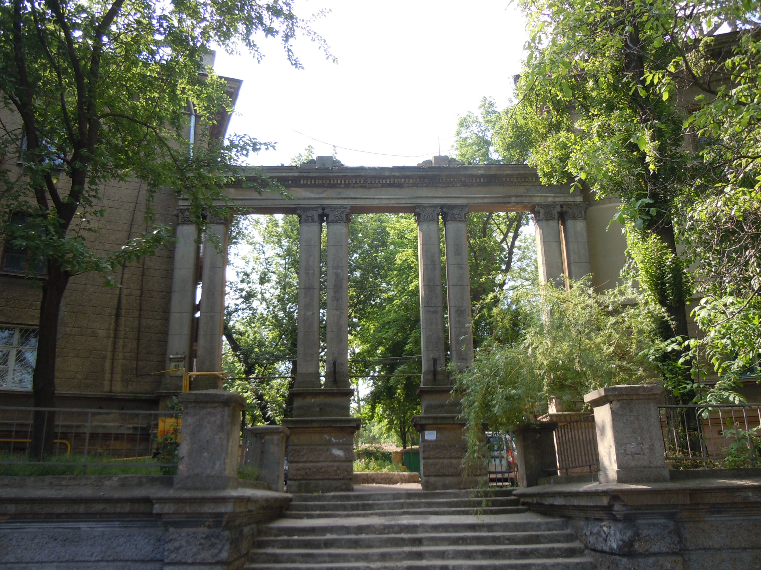 Будинок, збудований на місці зруйнованого собору Св. Клемента